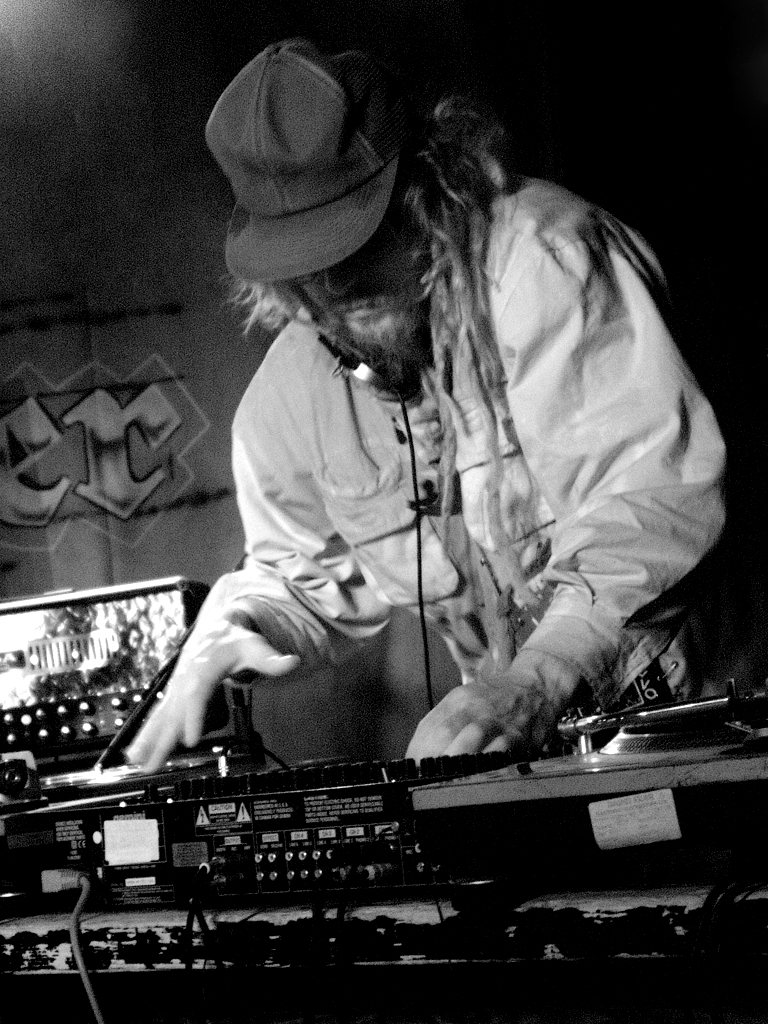 DJ Product von (hed)p.e.